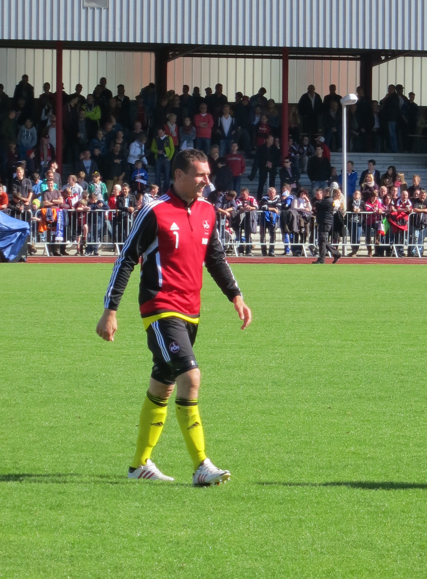 Raphael Schäfer 2013 in Coburg